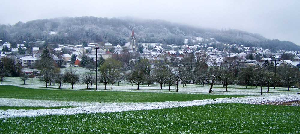 Gailinge am Hochrhy. Foto isch vu mir selber (Andreas Gruschke)